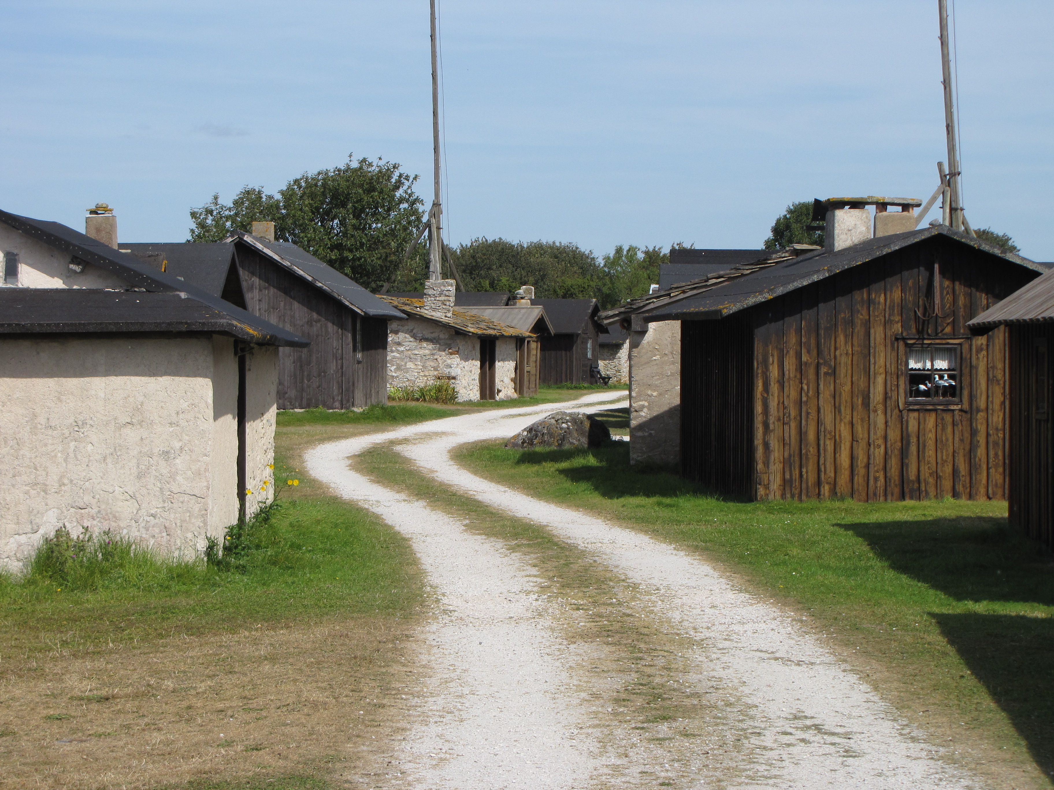 Tomtbod är ett fiskeläge som ligger på Gotlands sydöstra kust.